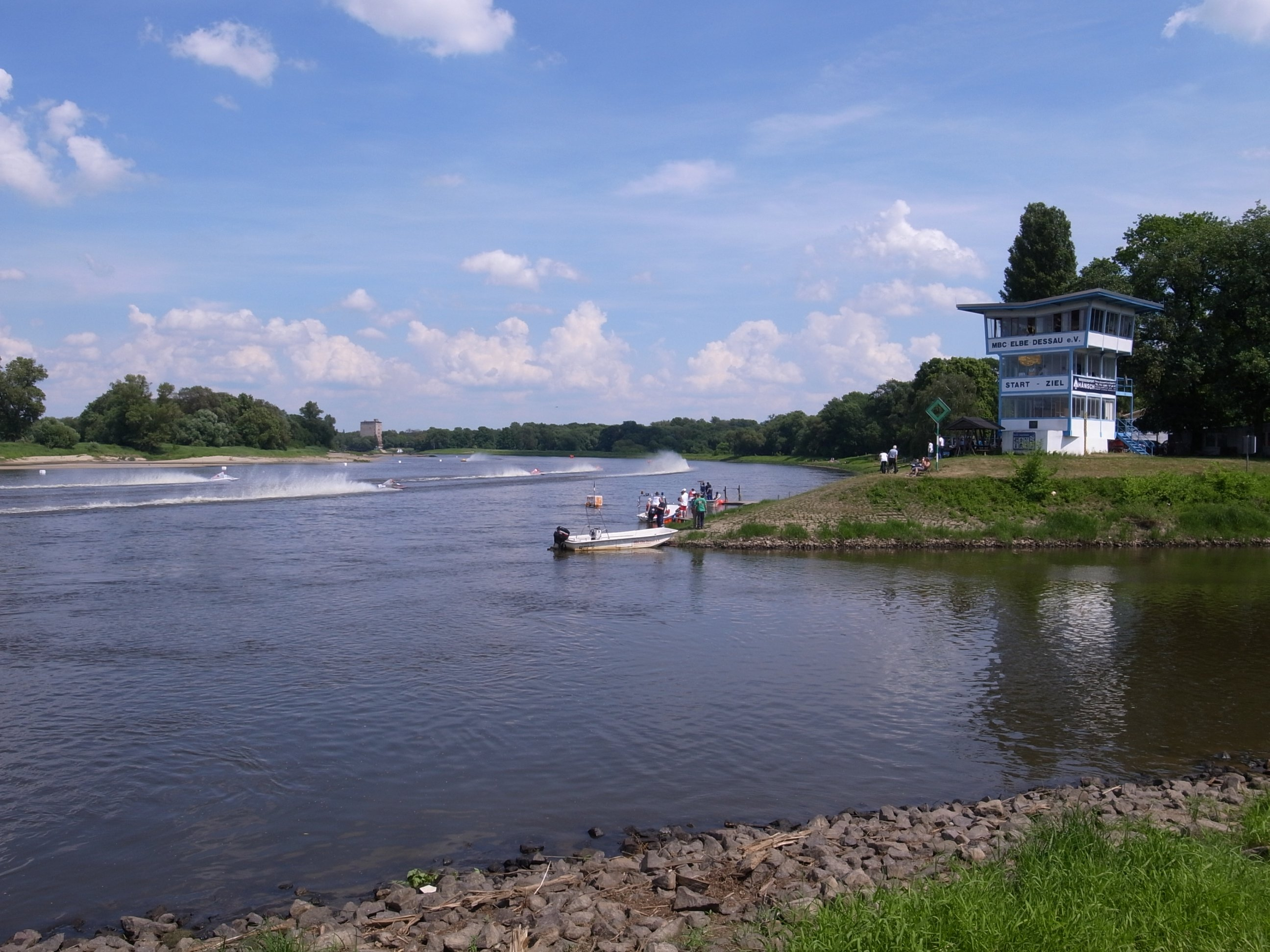 Dessau, Kornhauskurs, Motorbootrennen, Formel R 1000